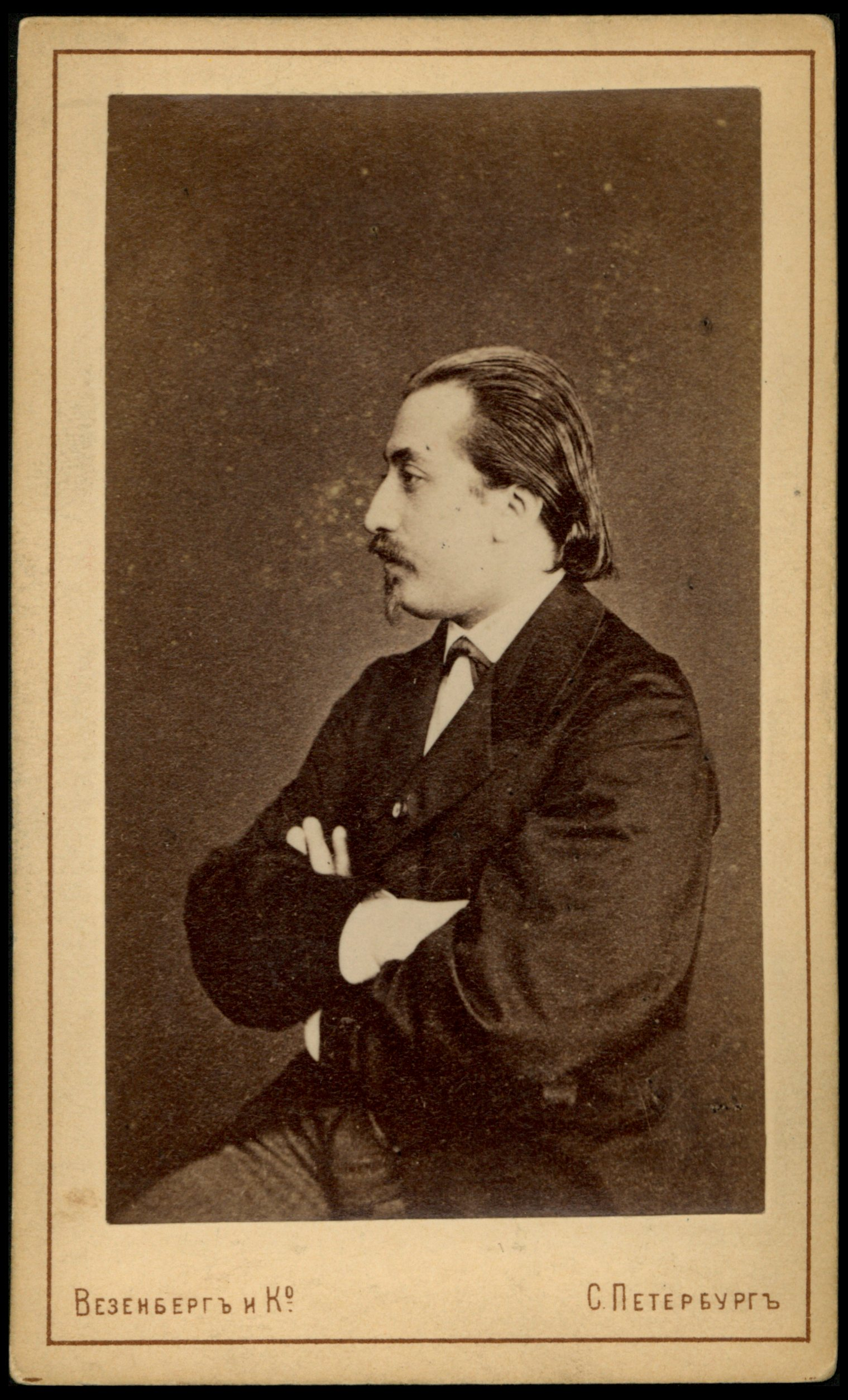 Portret Henryka Wieniawskiego, ok. 1865.